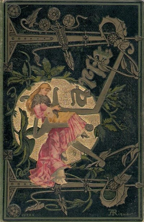 Couverture du roman María de Jorge Isaacs. Illustration de Alejandro de Riquer; Editions E Domenech, Barcelone, 1882.